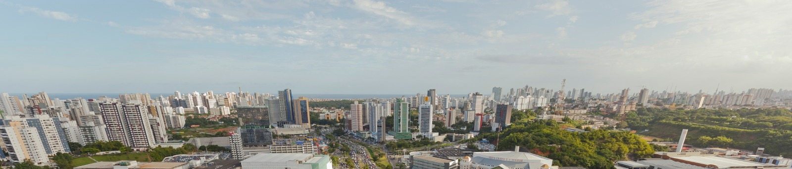 Vista aérea de parte de Salvador Date 2012-08-21